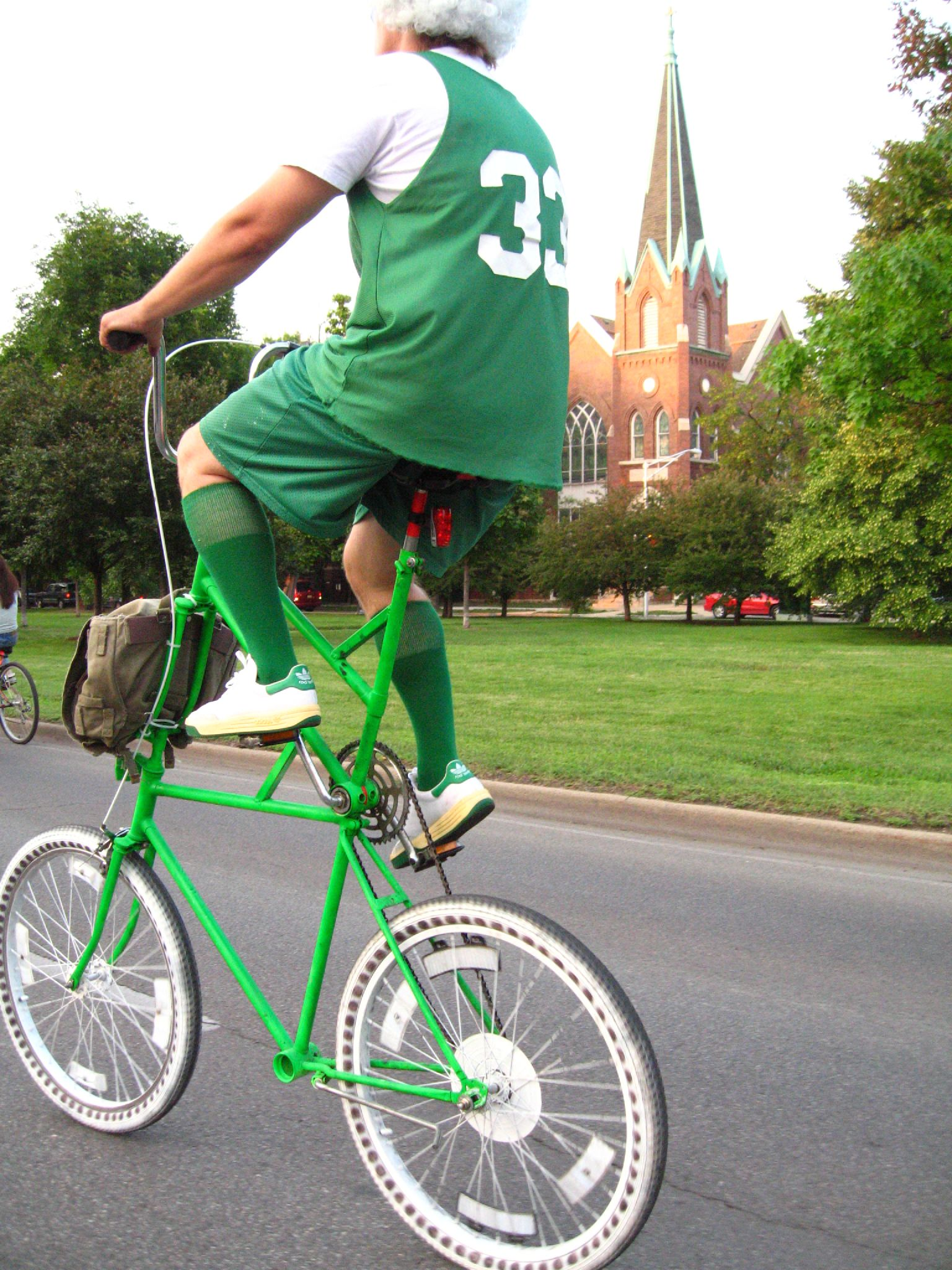 One less car